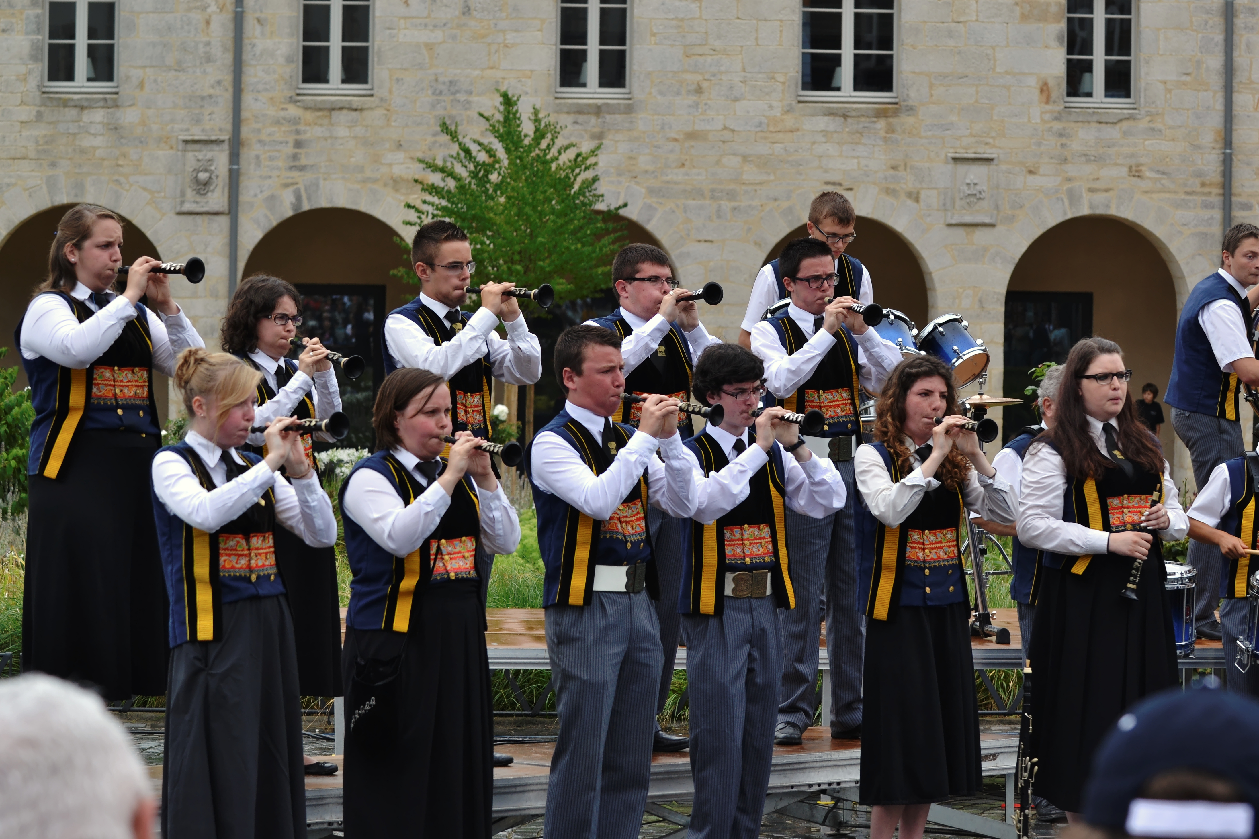 Le Bagad Glazik Kemper lors du championnat national des bagadoù (troisième catégorie) au Festival de Cornouaille, Esplanade François Mitterrand à Quimper, le 27 juillet 2013.